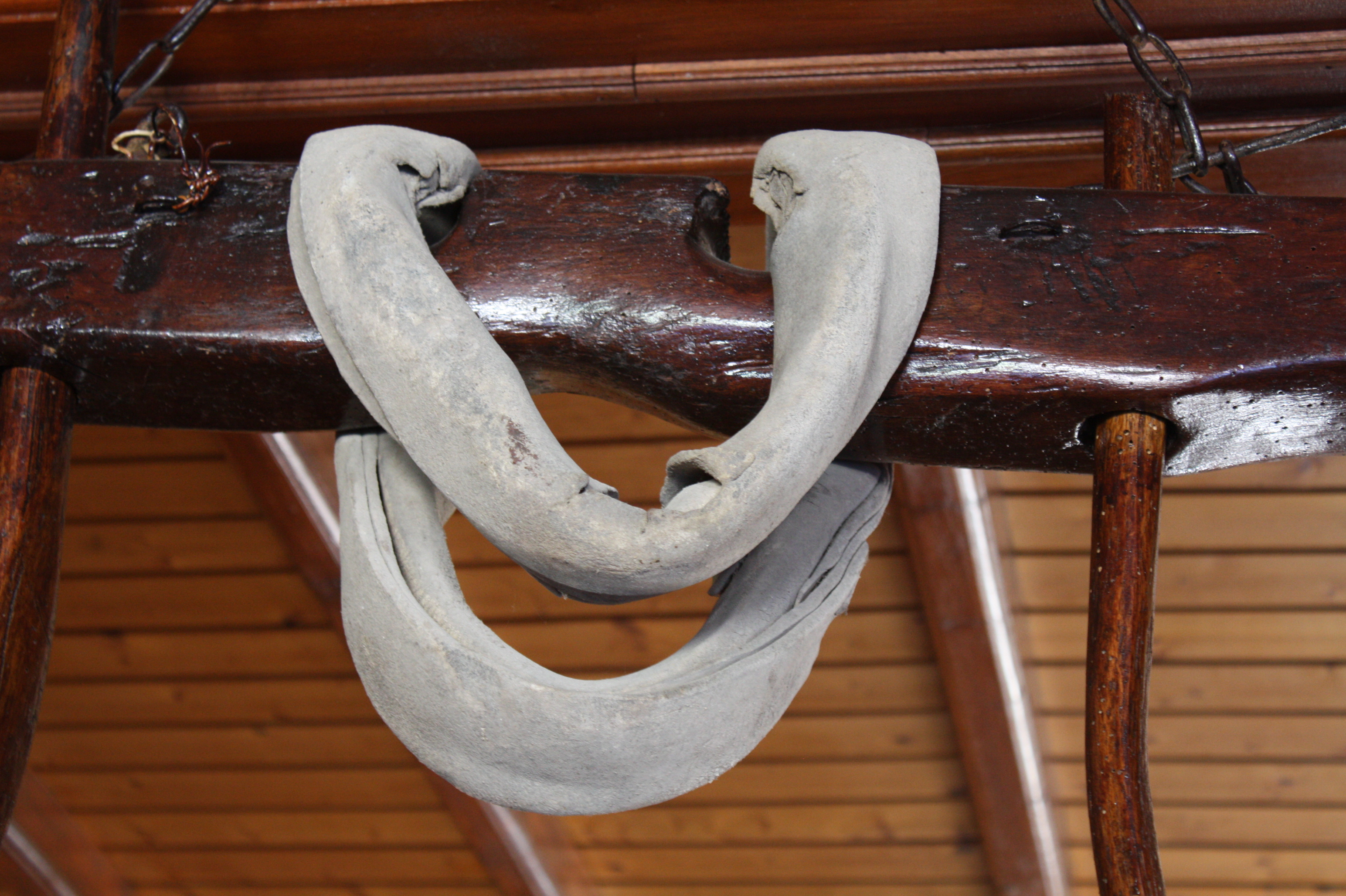 Loro ou estrobo, peza de coiro que suxeita o xugo á cabezalla do carro.